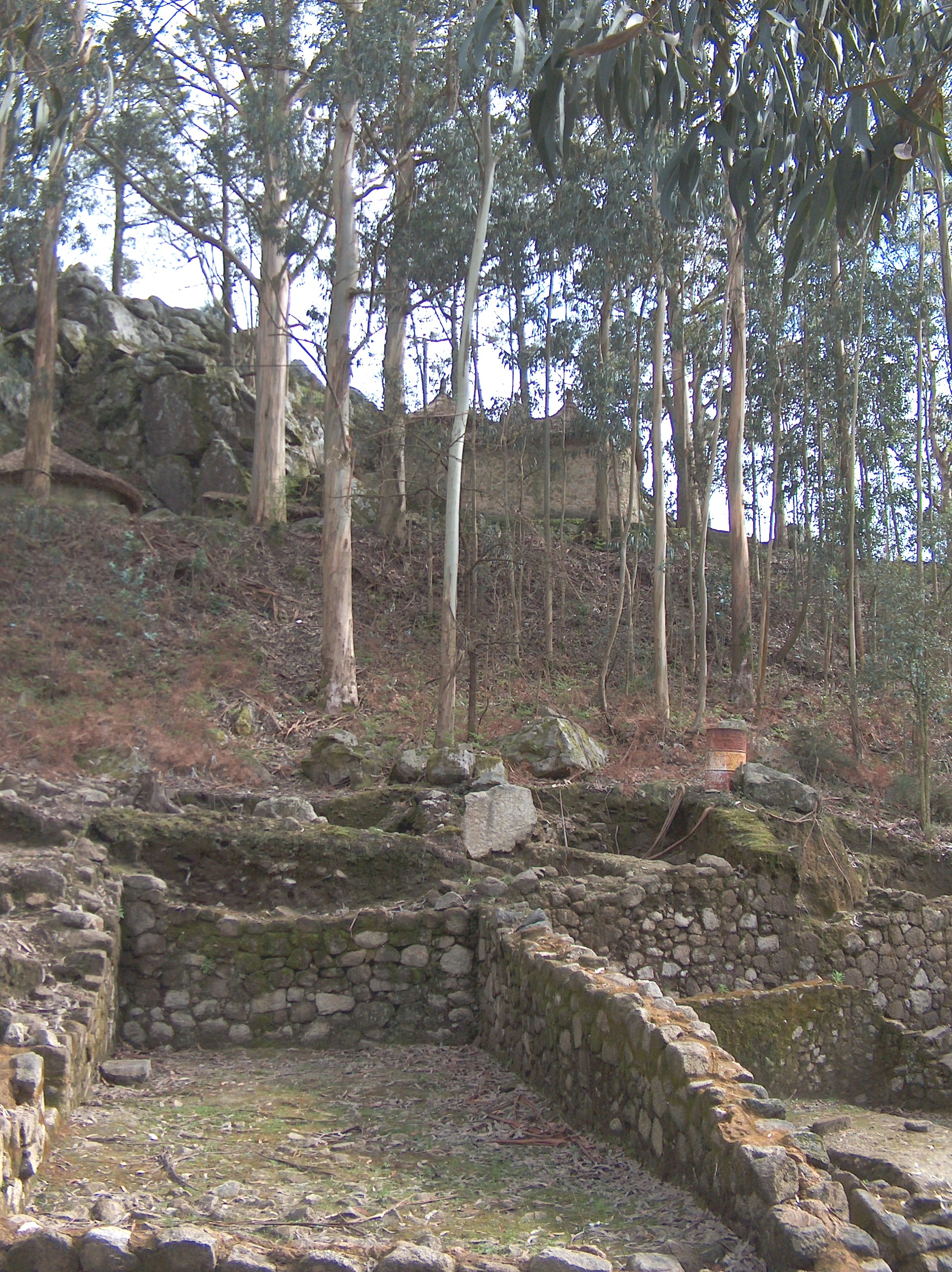 Castro de São Lourenço. Castro de São Lourenço, na freguesia de Vila Chã,concelho de Esposende, distrito de Braga, Portugal.